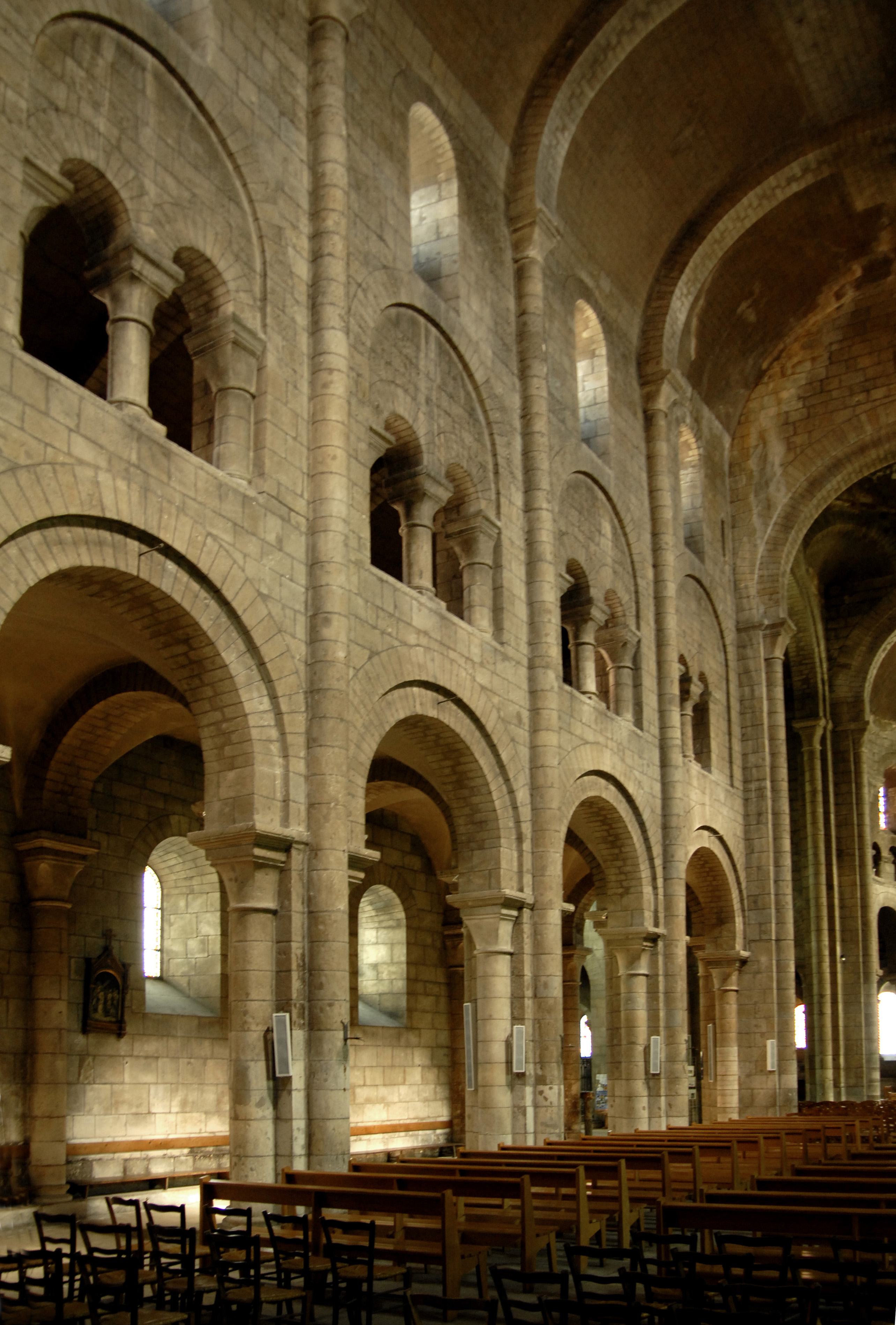 St.-Etienne Nevers, nördl. Scheidewand